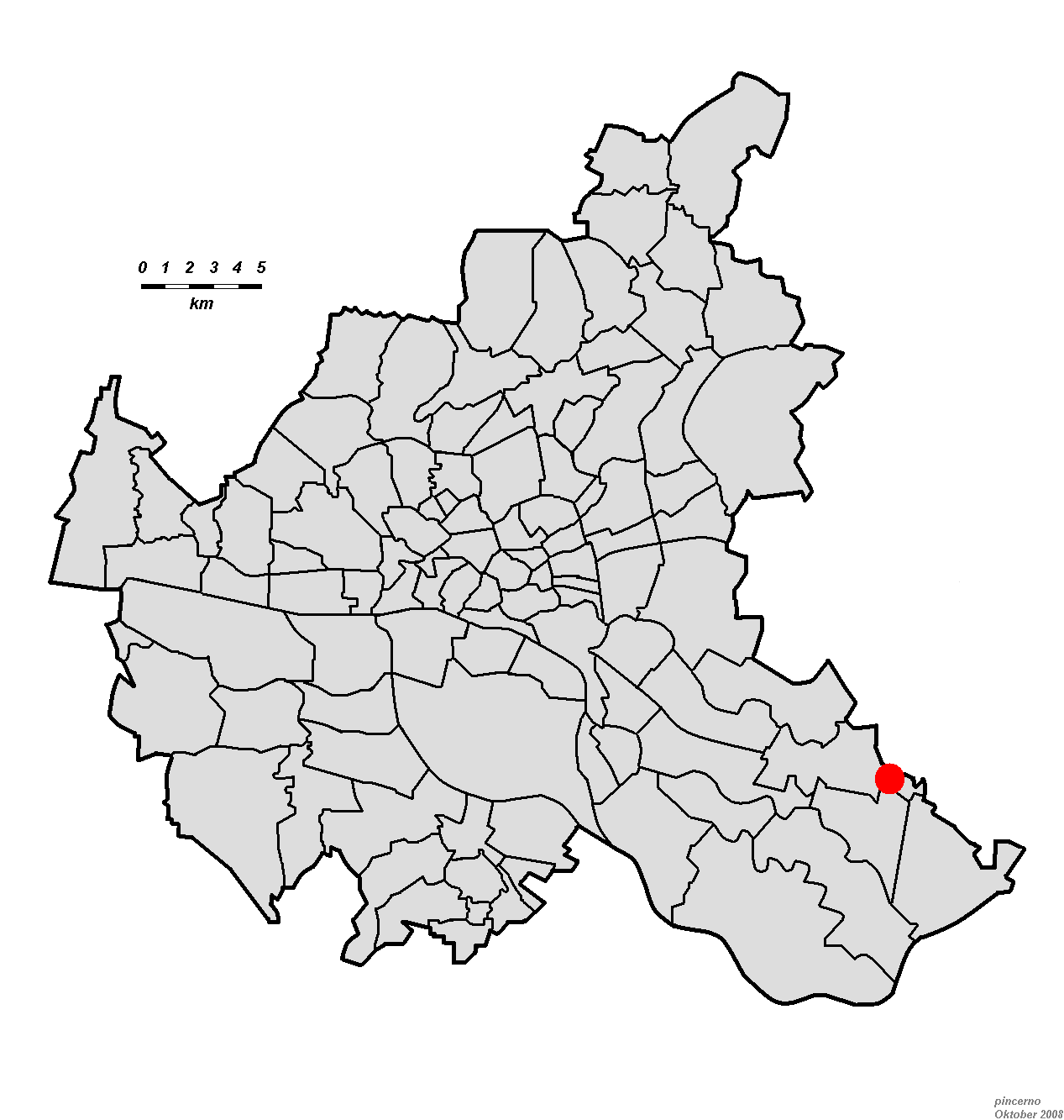 Lage der Sternwarte in Hamburg.